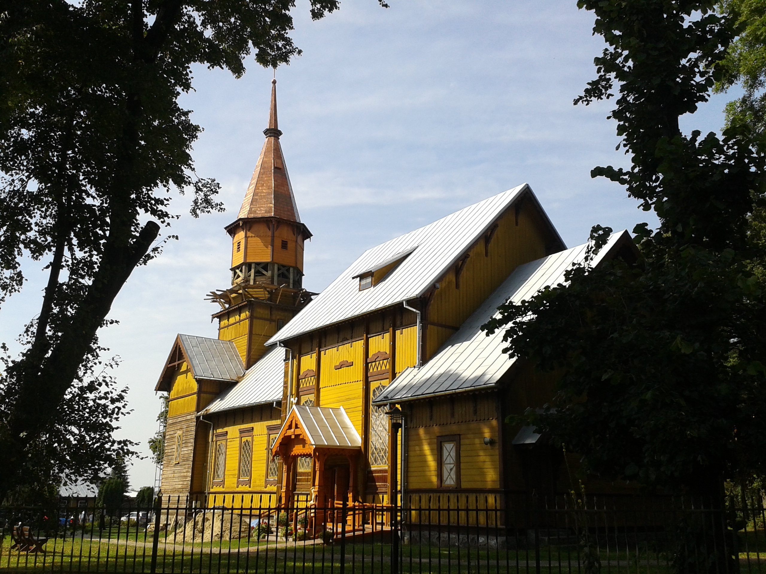 Widok kościoła Przemienienia Pańskiego w Horbowie od południowego wschodu